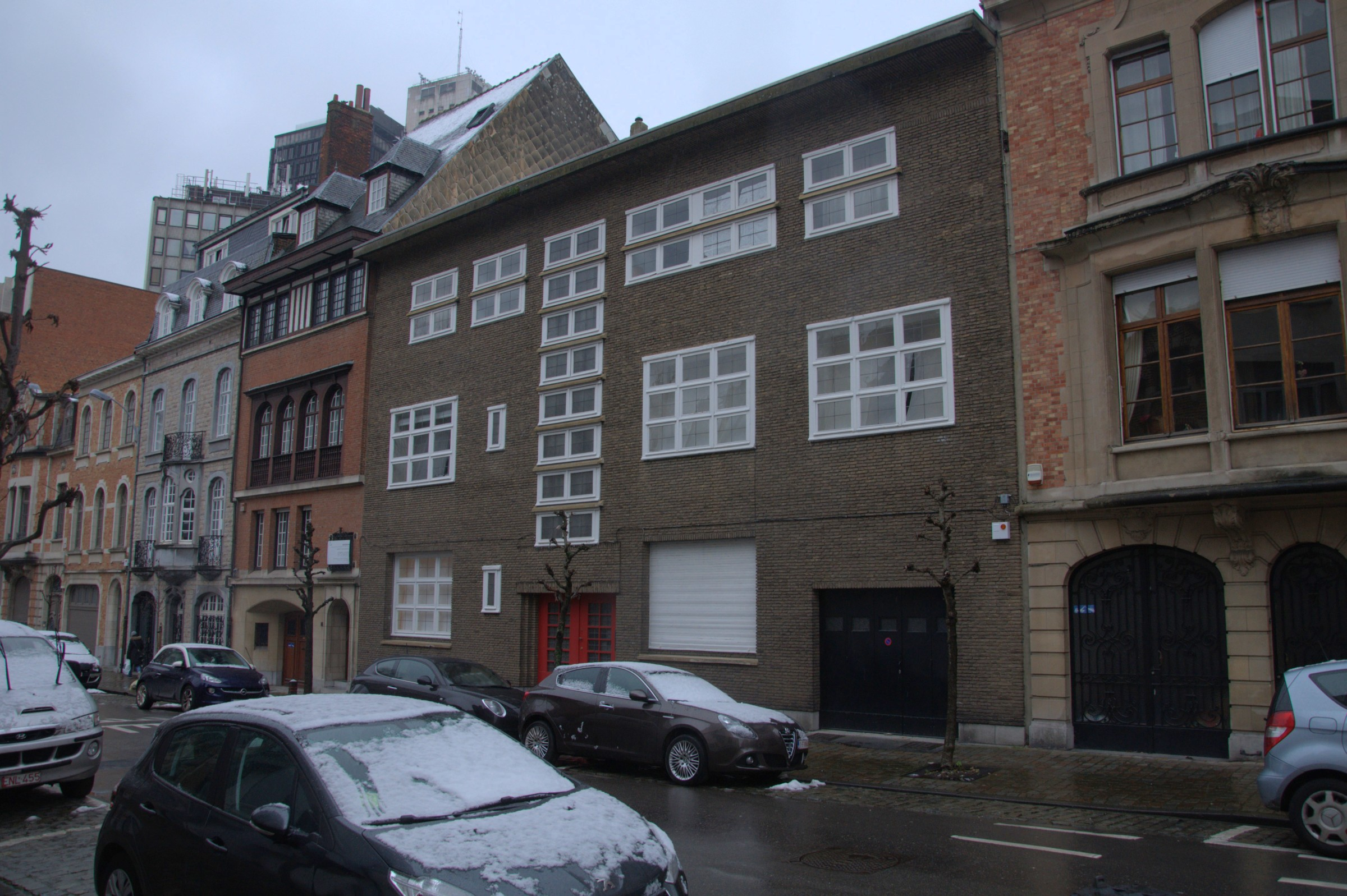 patrimoine immobilier de bruxelles